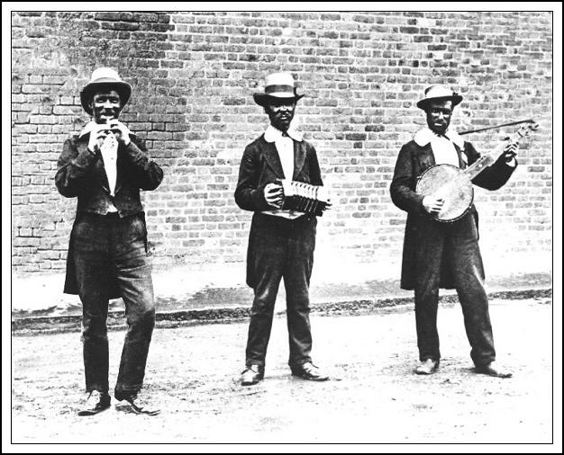 Minstrels in London